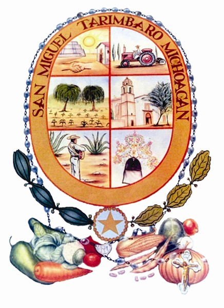 Stemma Tarimbaro